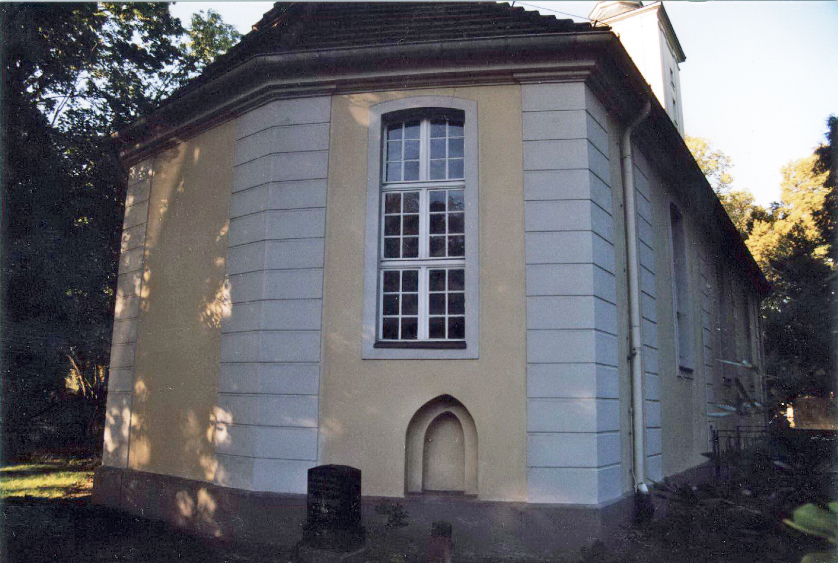 Das Foto zeigt auf der Ostwand der Dorfkirche Heiligensee den unregelmäßigen 5/8 Schluss eines Polygonalchors. Im Mittelpunkt das Bildes sieht man über dem Erdboden eine zugesetzte spitzbogige Nische.